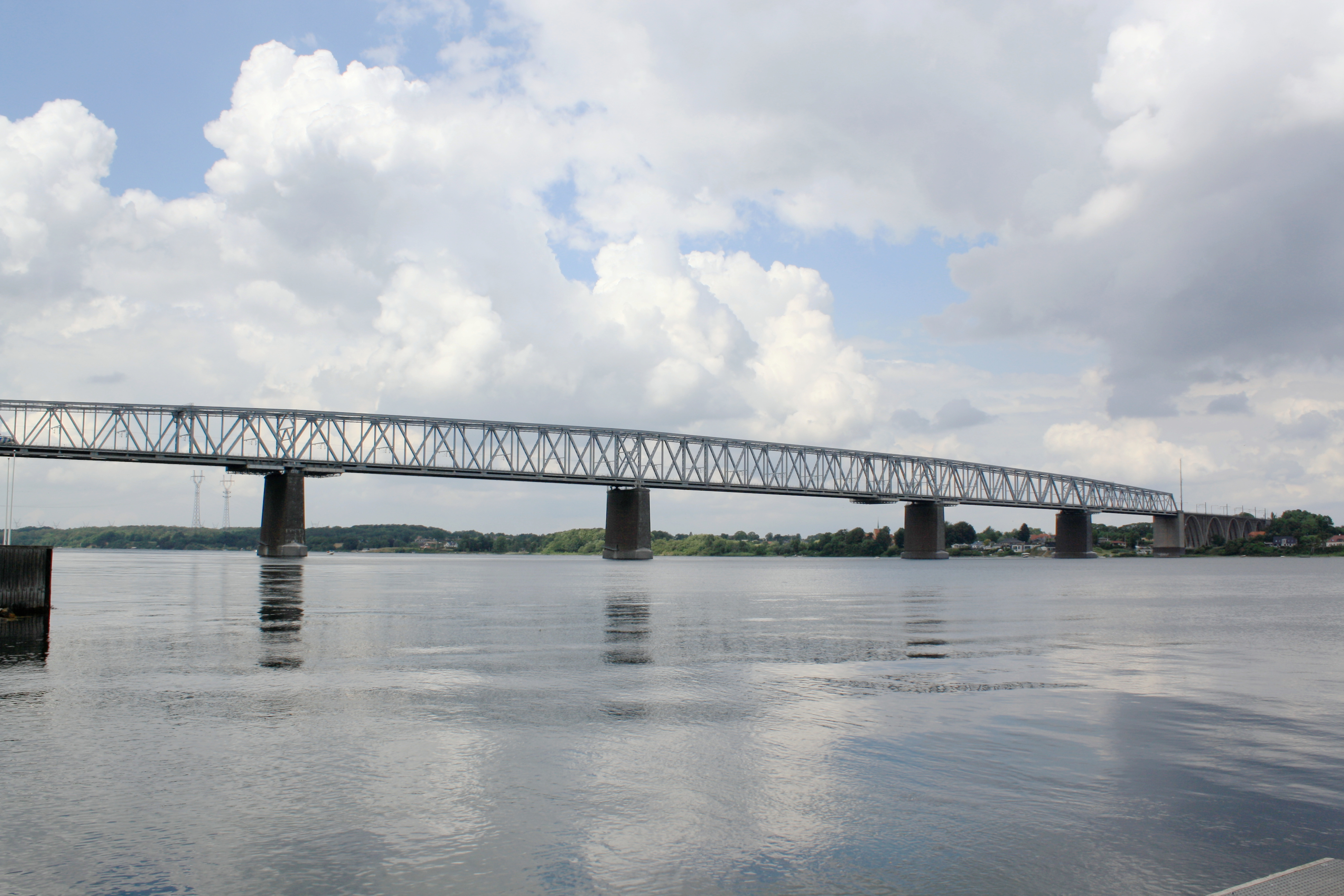 Lillebæltsbro viewed from Middelfart